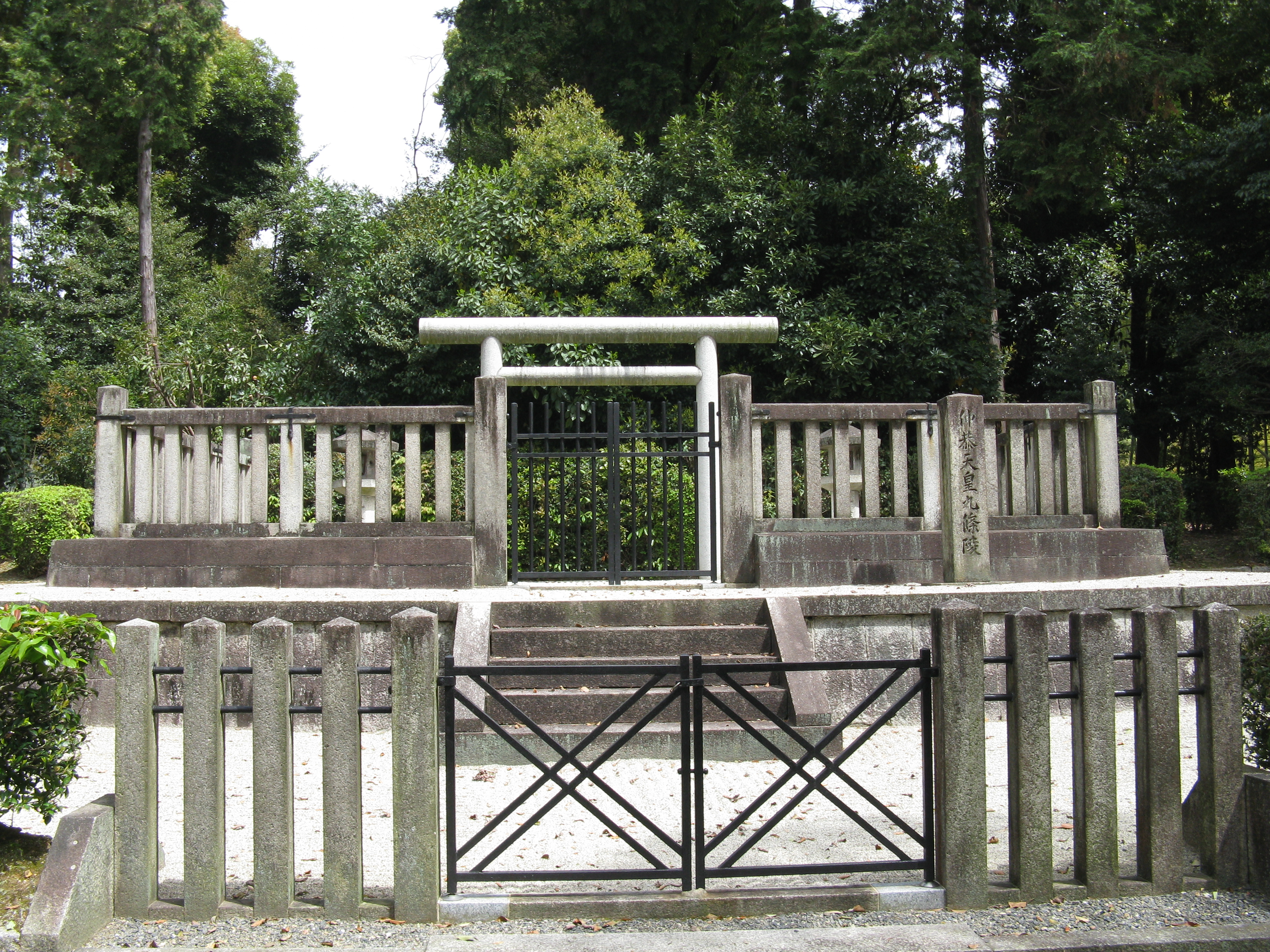 仲恭天皇 九条陵